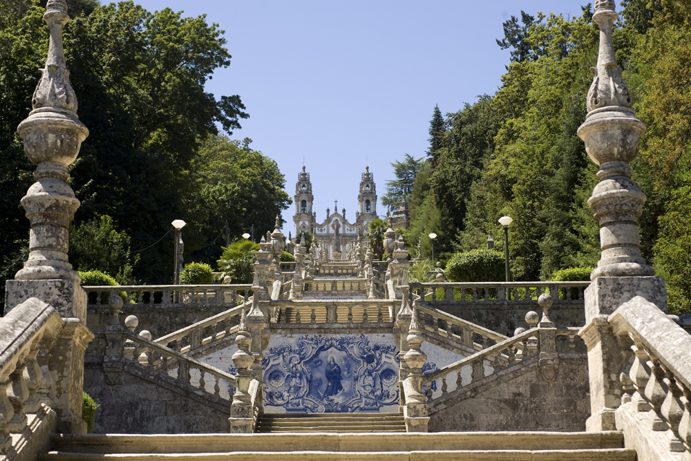 Unidentified Cultural Heritage Portugal